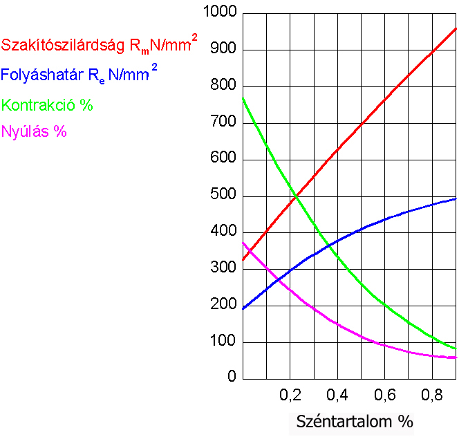 Szénacélok szilárdságának változása a széntartalom függvényében